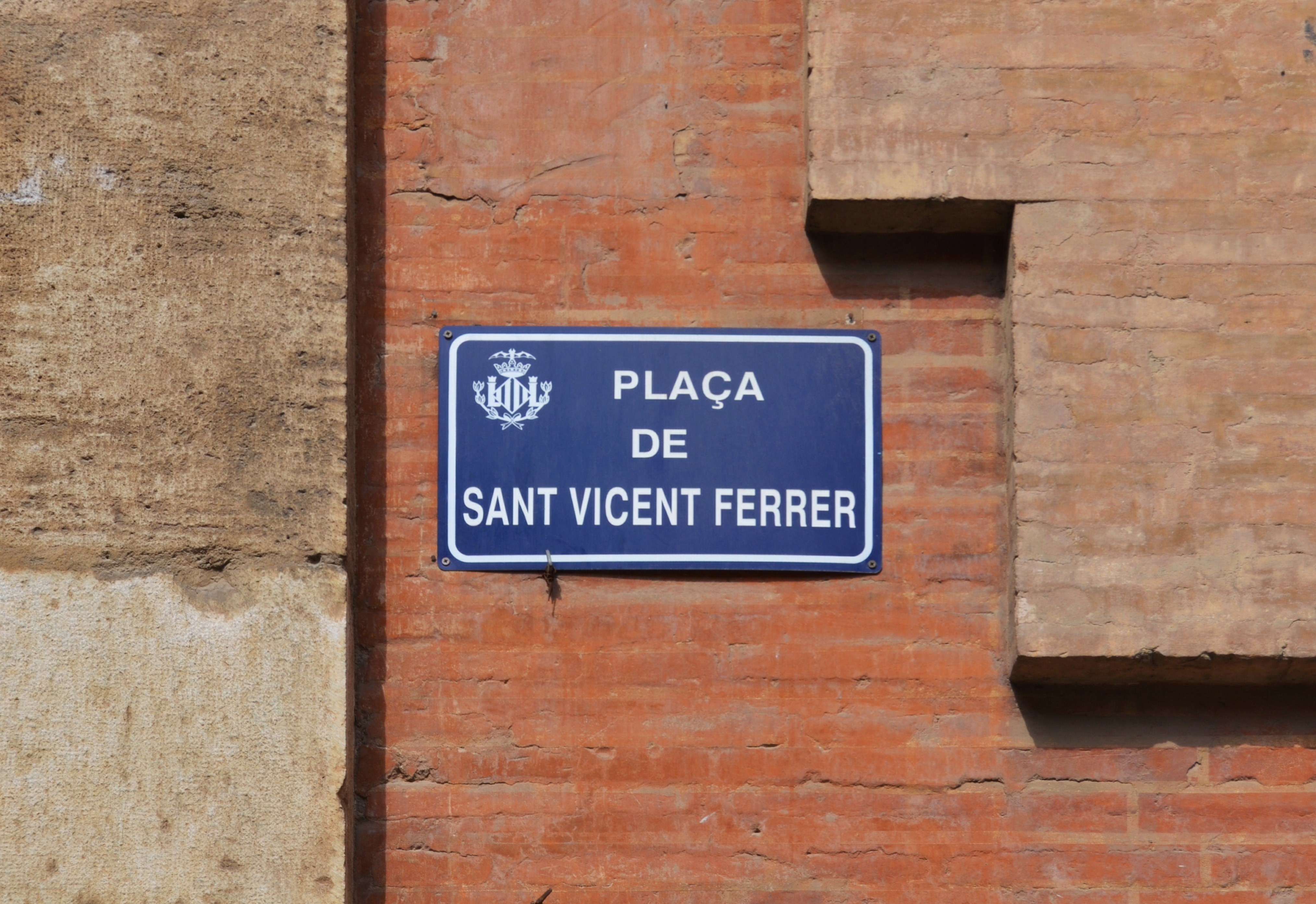 Plaça de sant Vicent Ferrer de València, placa.